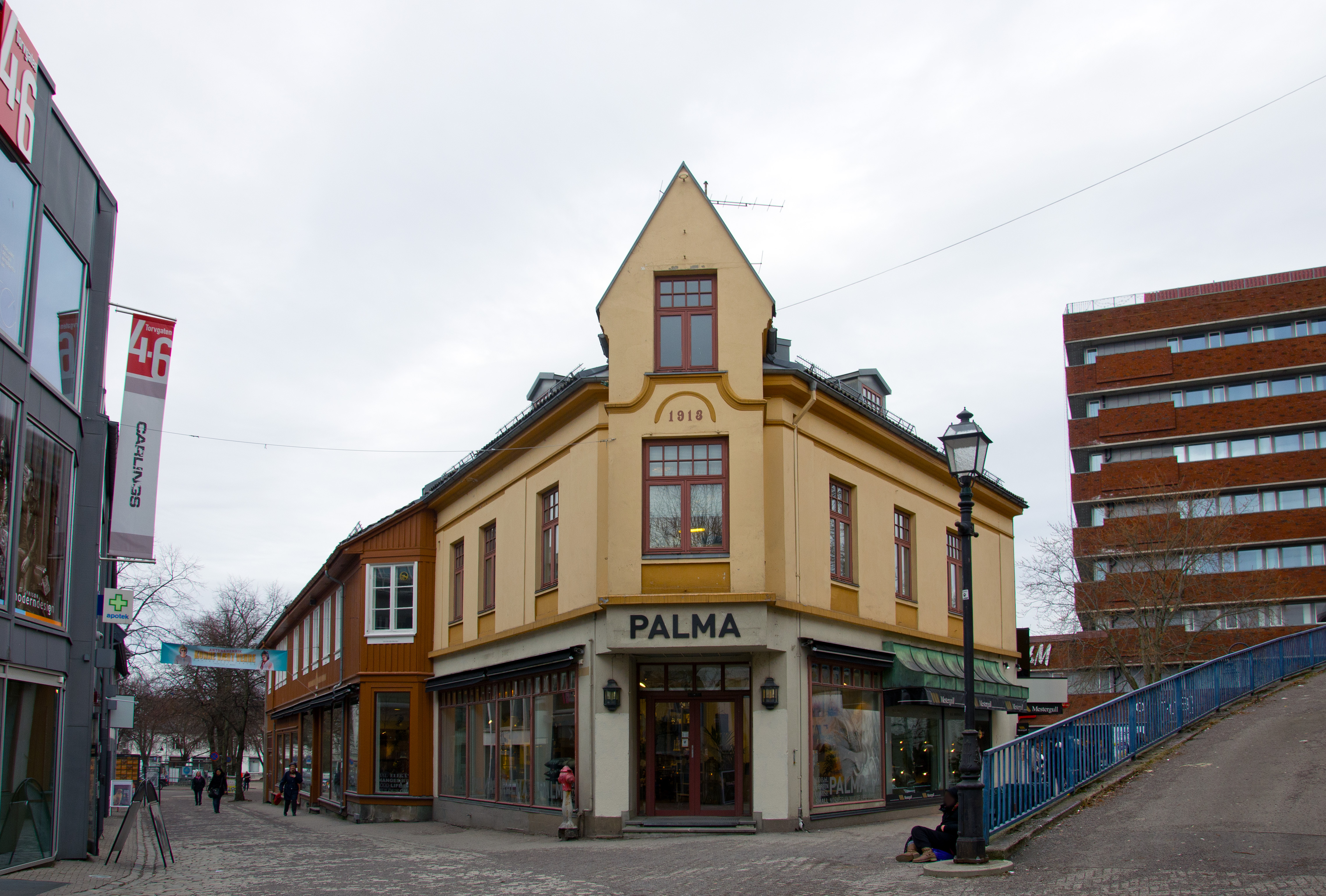 Fayes gate 1, Tønsberg